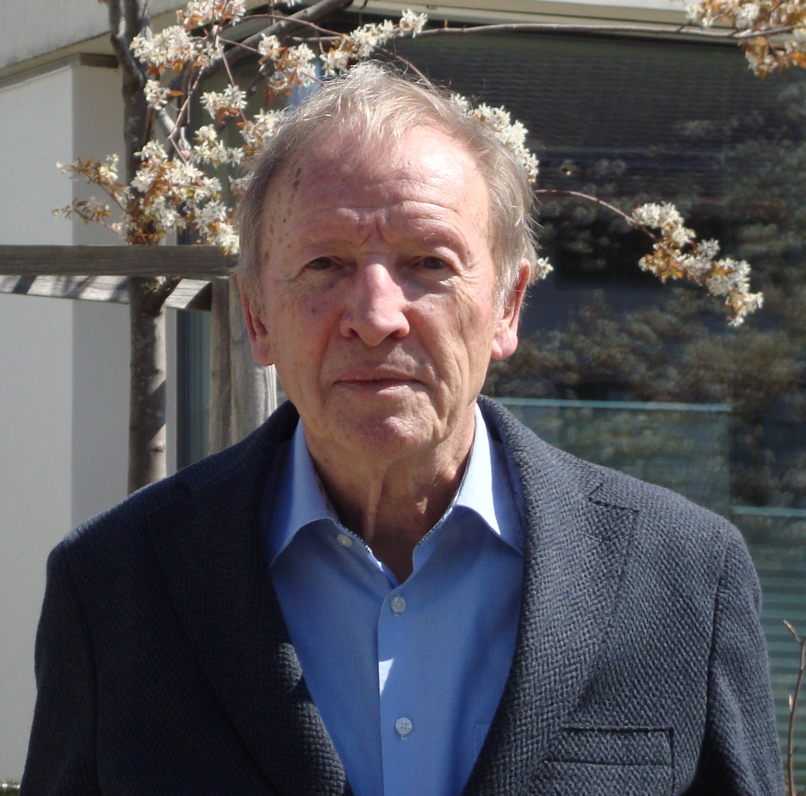 Portraitfoto 2020-04-07 Hans Bosshard